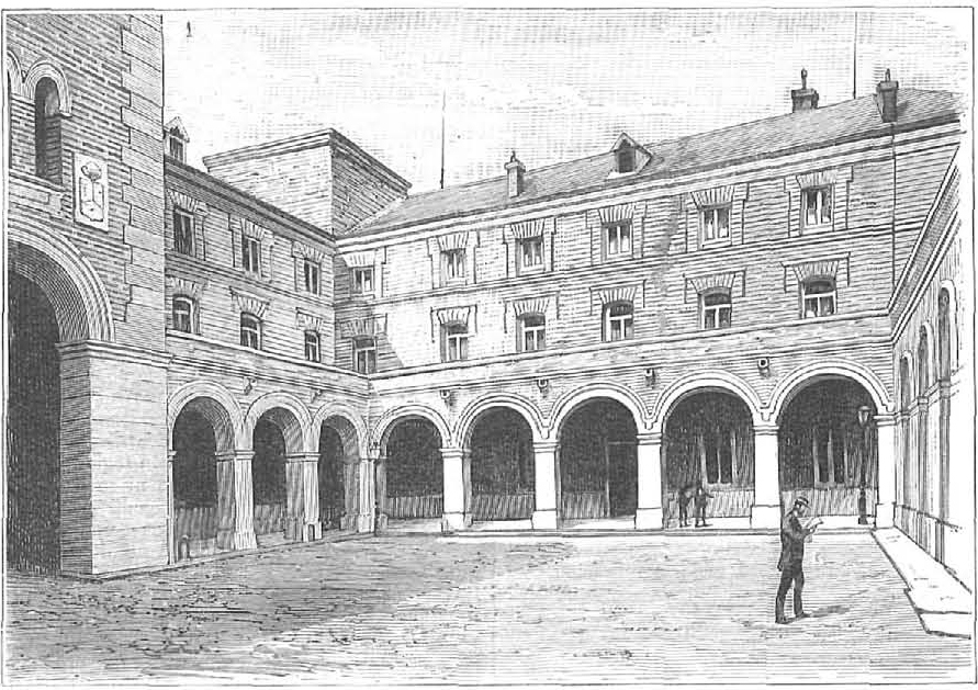 Interior de la Cárcel Modelo de Madrid, en la revista española La Ilustración Española y Americana.